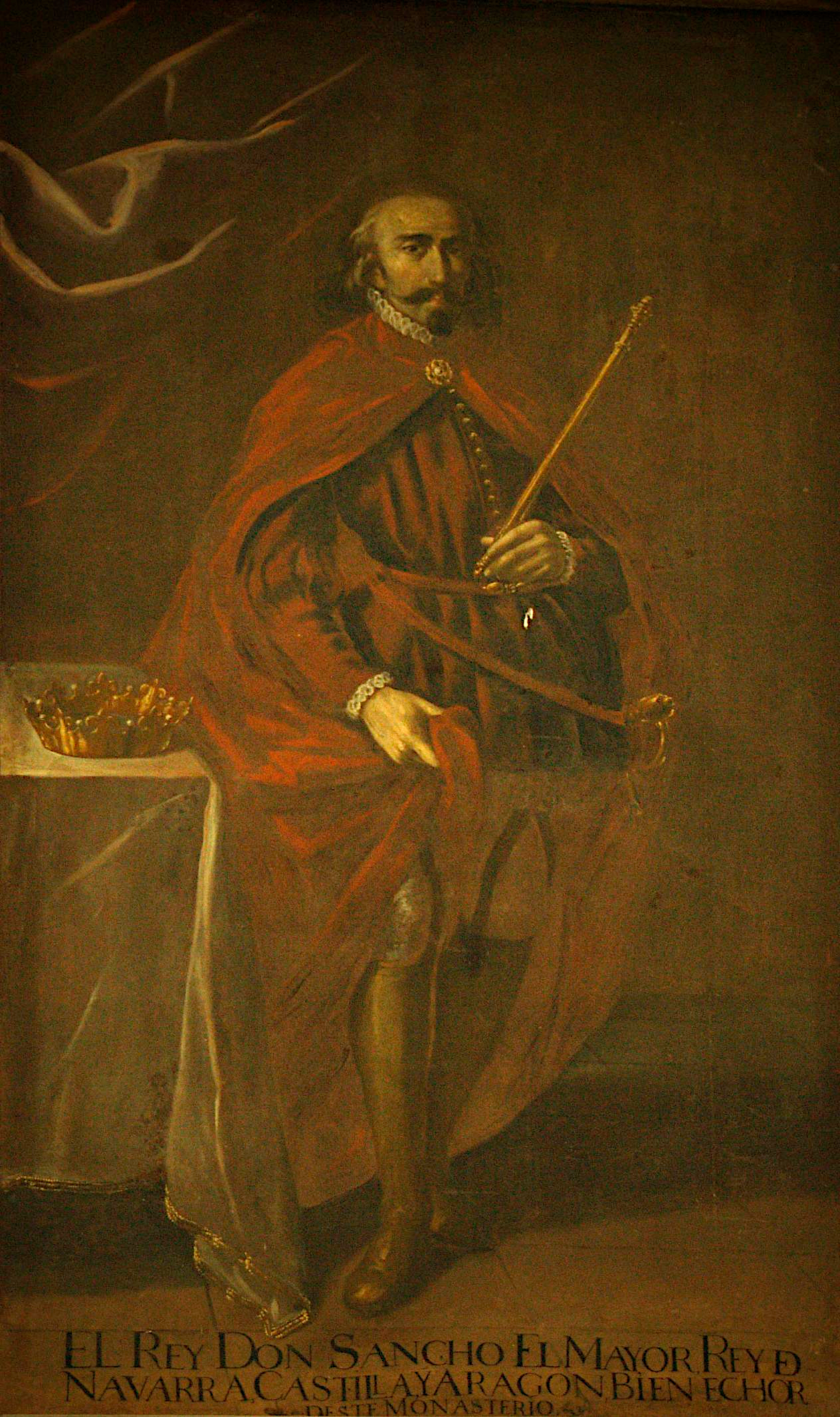 Retrato de Don Sancho el Mayor